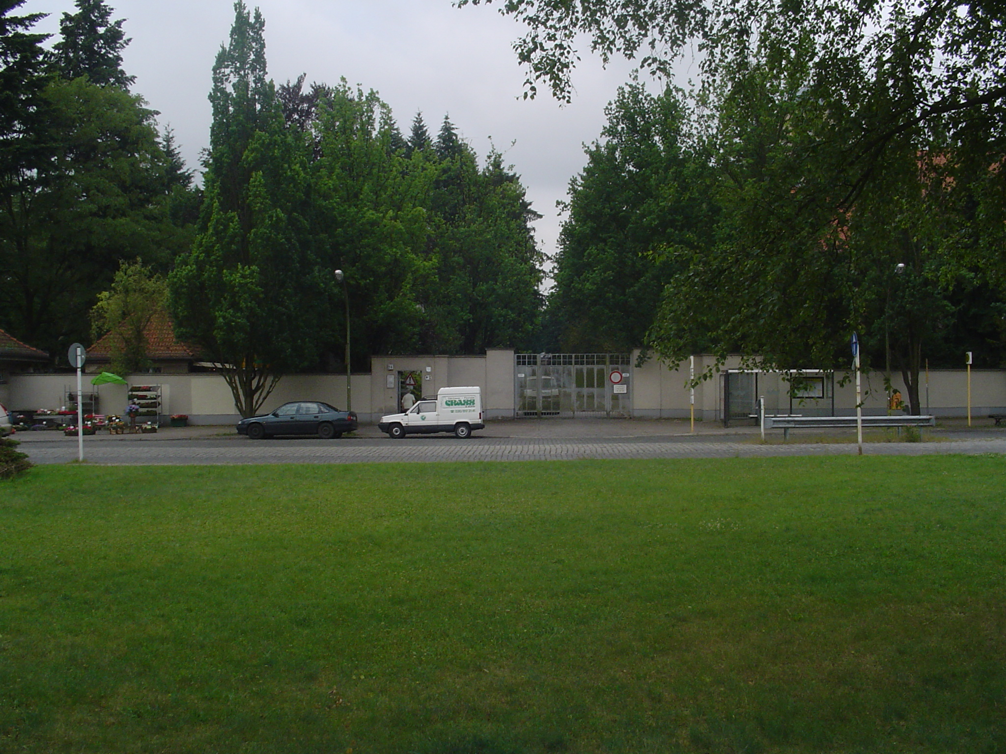 Eingang zum Parkfriedhof Lichterfelde in Berlin-Lichterfelde, Aufnahme von Osten